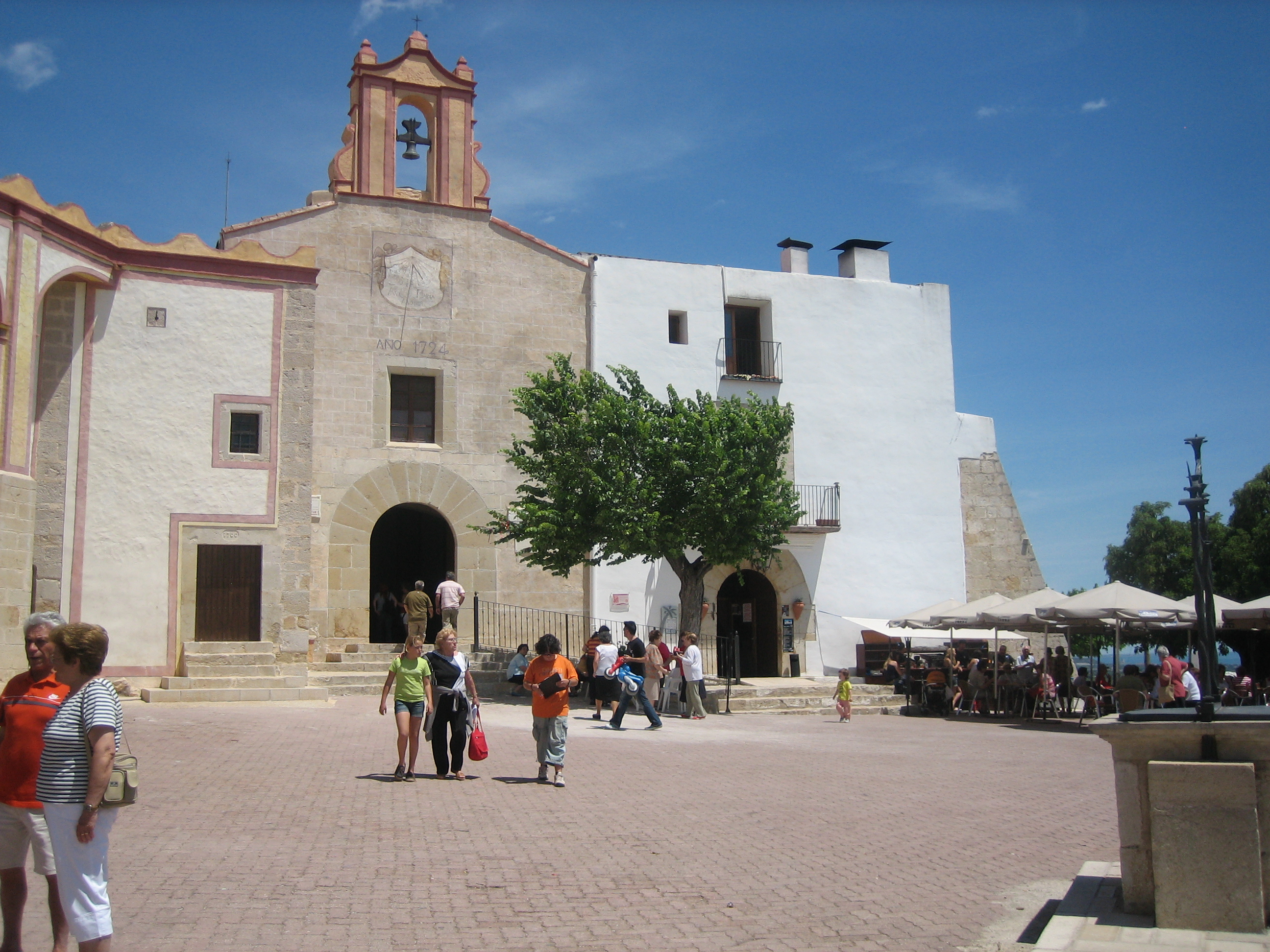 Ermita de la Mare de Déu de la Misericòrdia i de Sant Sebastià de Vinaròs (Baix Maestrat)